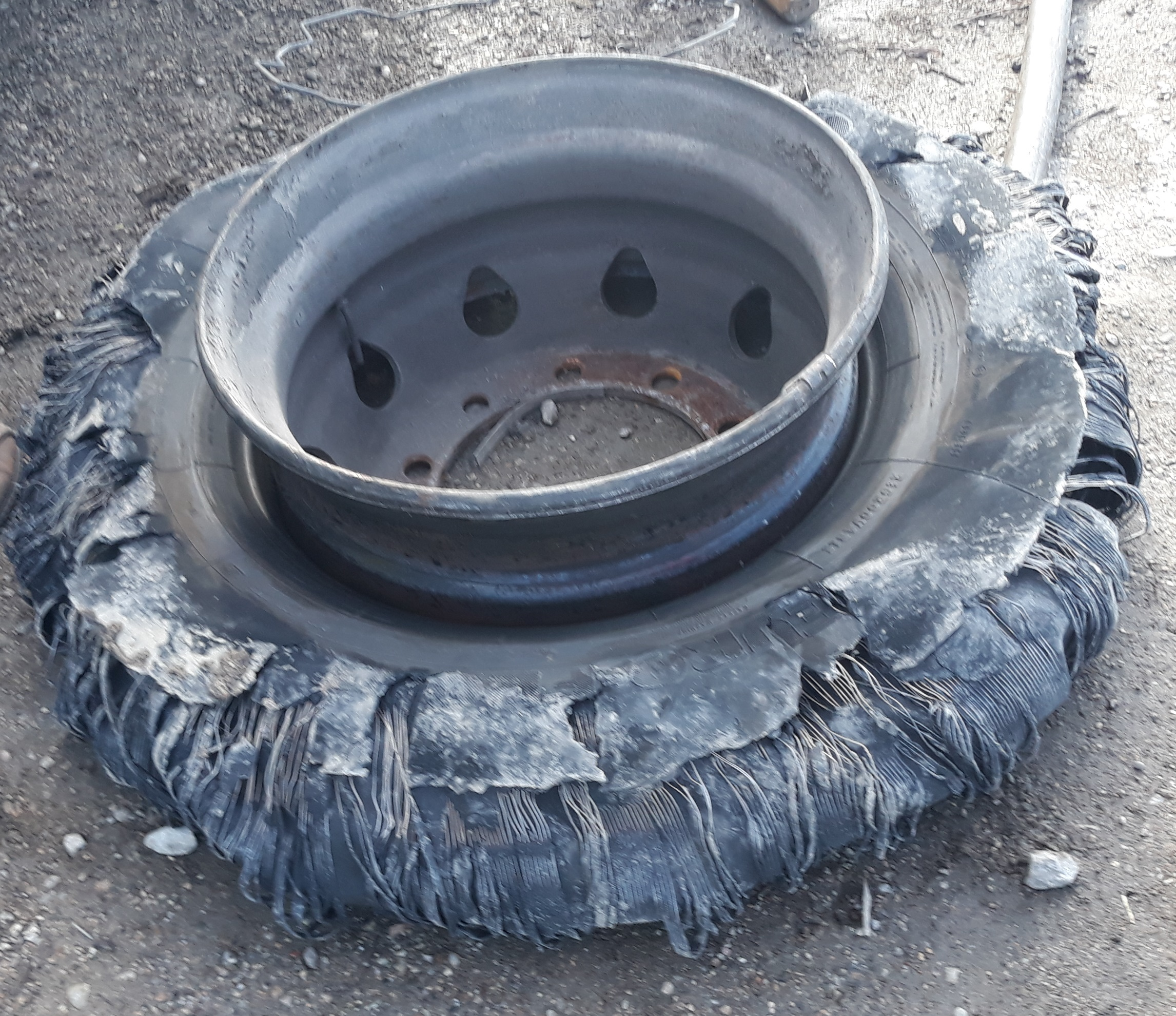 Распаднут пнеуматик за аутобус.